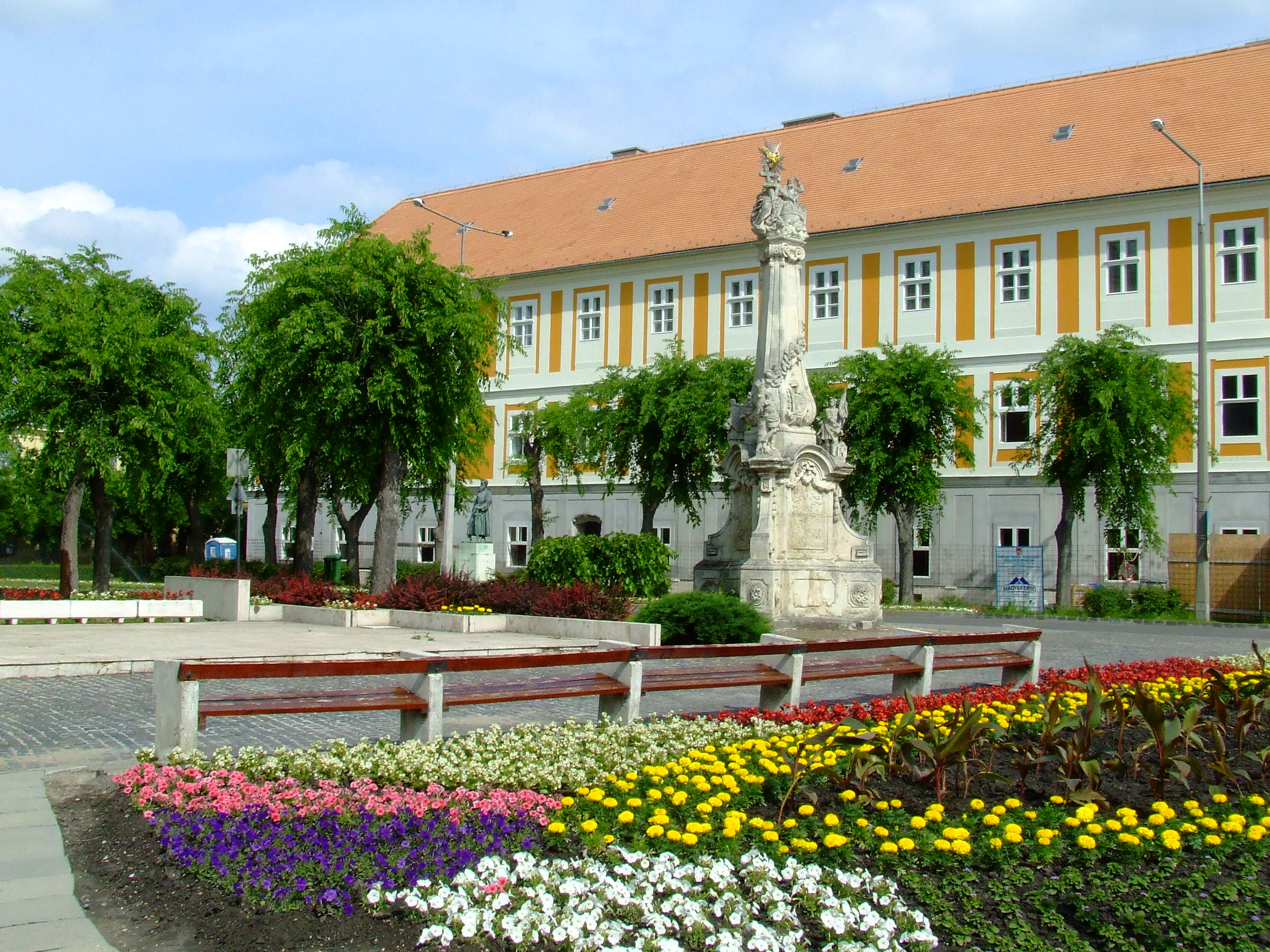 A kalocsai Szentháromság tér a Szentháromság-oszloppal. Az oszlopot Kalocsa városa 1786-ban állíttatta, 1879-ben helyezték jelenlegi helyére. 1980-ban restaurálták. Műemléki védelem alatt áll. Mögötte a volt Nagyszeminárium, szintén műemléki védelem alatt áll. This is a photo of a monument in Hungary. Identifier: 2214